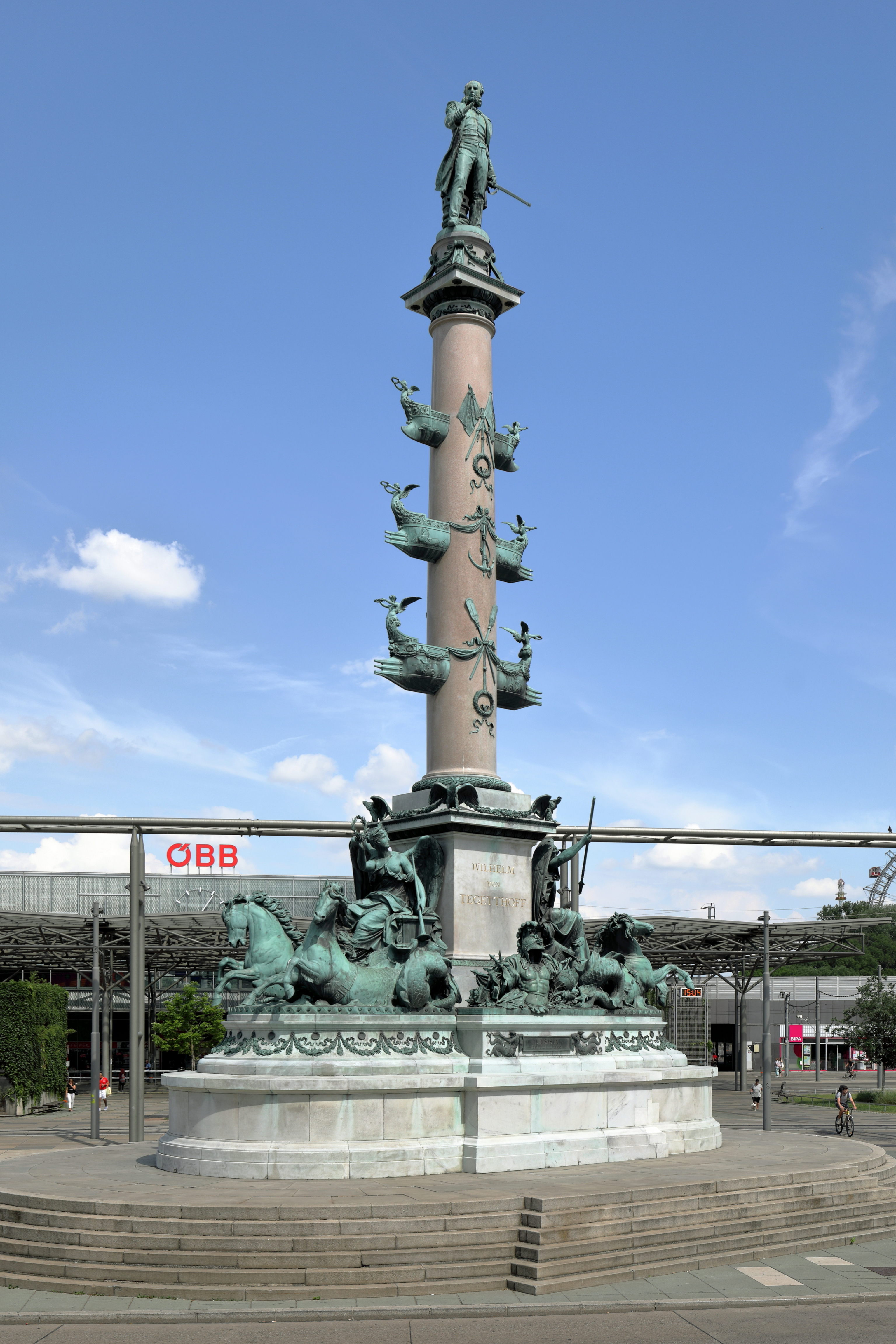 Westansicht des Tegetthoff-Denkmals am Praterstern im 2. Wiener Gemeindebezirk Leopoldstadt. Das Denkmal wurde von Carl Kundmann (Statue) und Carl von Hasenauer (Architektur) gestaltet und zu Ehre von Wilhelm von Tegetthoff errichtet. Das Denkmal mit einer rd. 11 Meter hohen Marmorsäule und einer 3,5 Meter hohen bronzenen Statue des Admirals wurde am 21. September 1886 enthüllt.